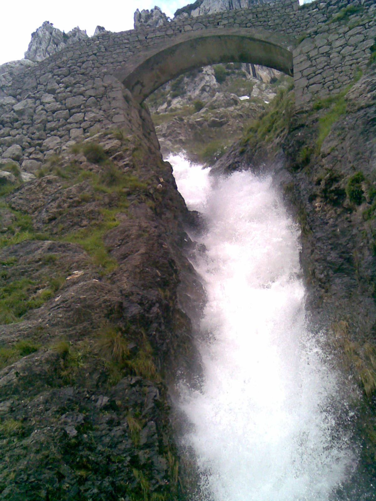 chorro de agua en Poncebos, Cabrales ( Asturias )